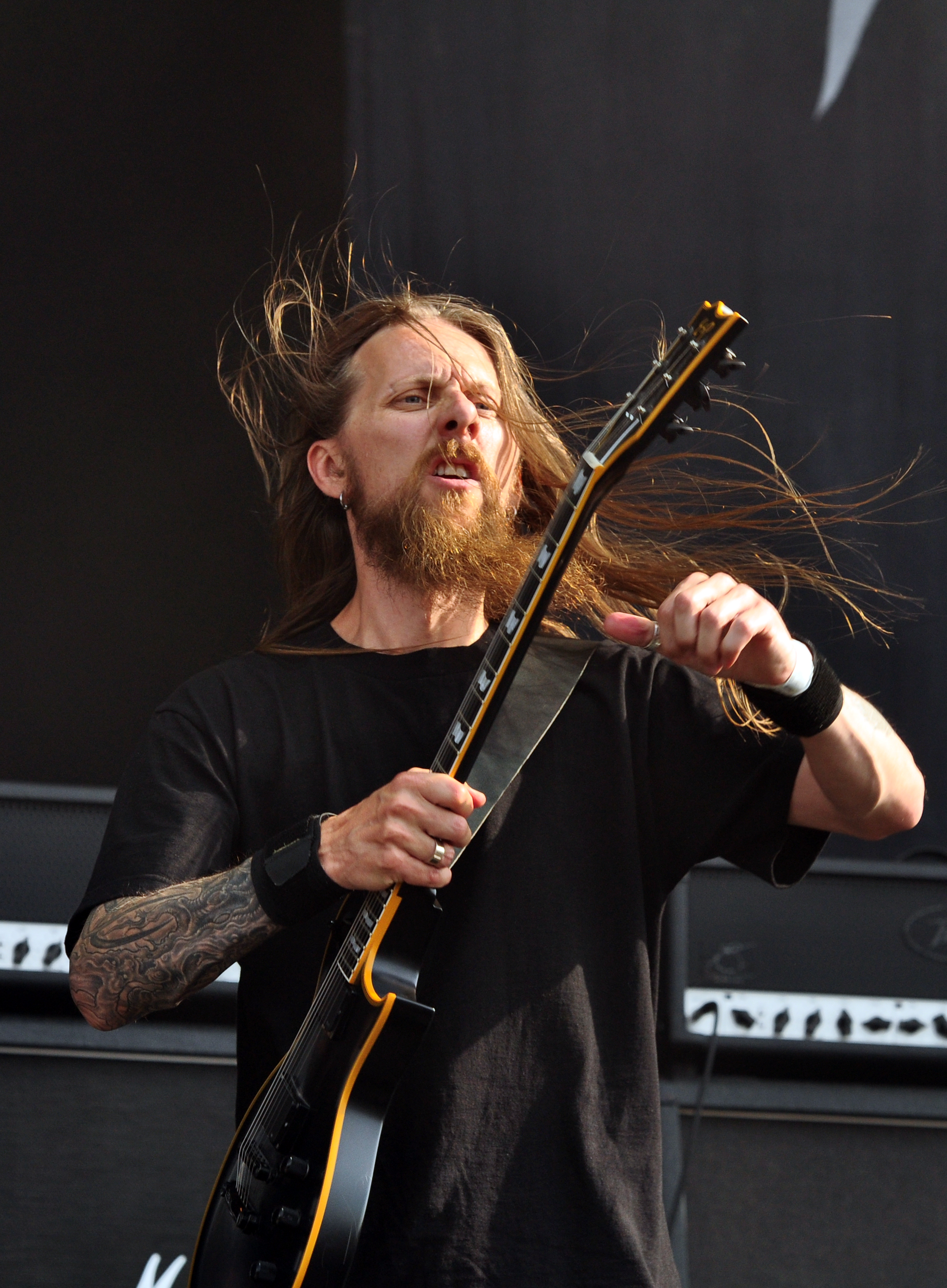 02-08-2014-Tomas „Samoth“ Haugen with Emperor at Wacken Open Air 2014-JonasR 07